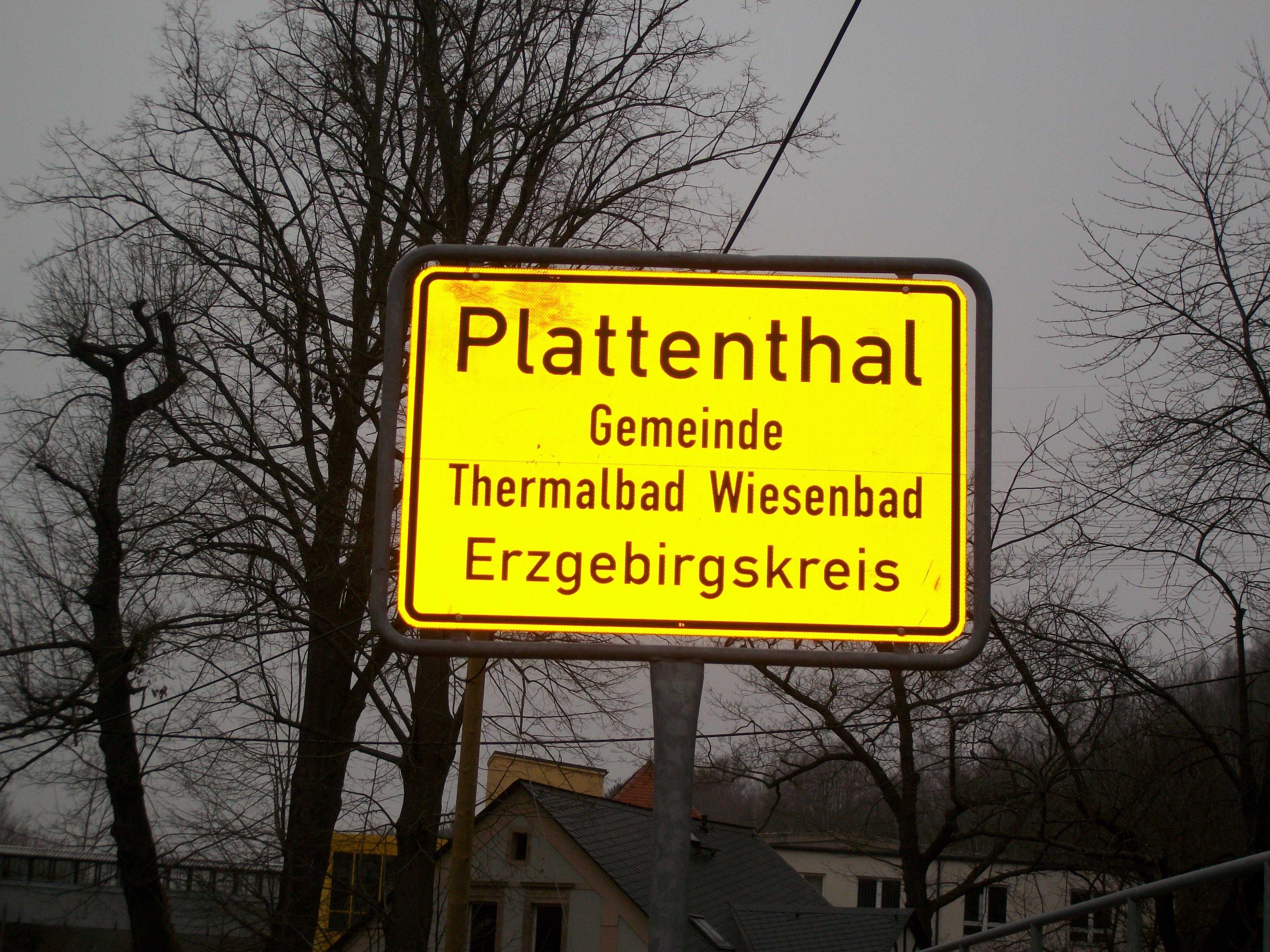 Ortseingangsschild Plattenthal, Gemeinde Thermalbad Wiesenbad